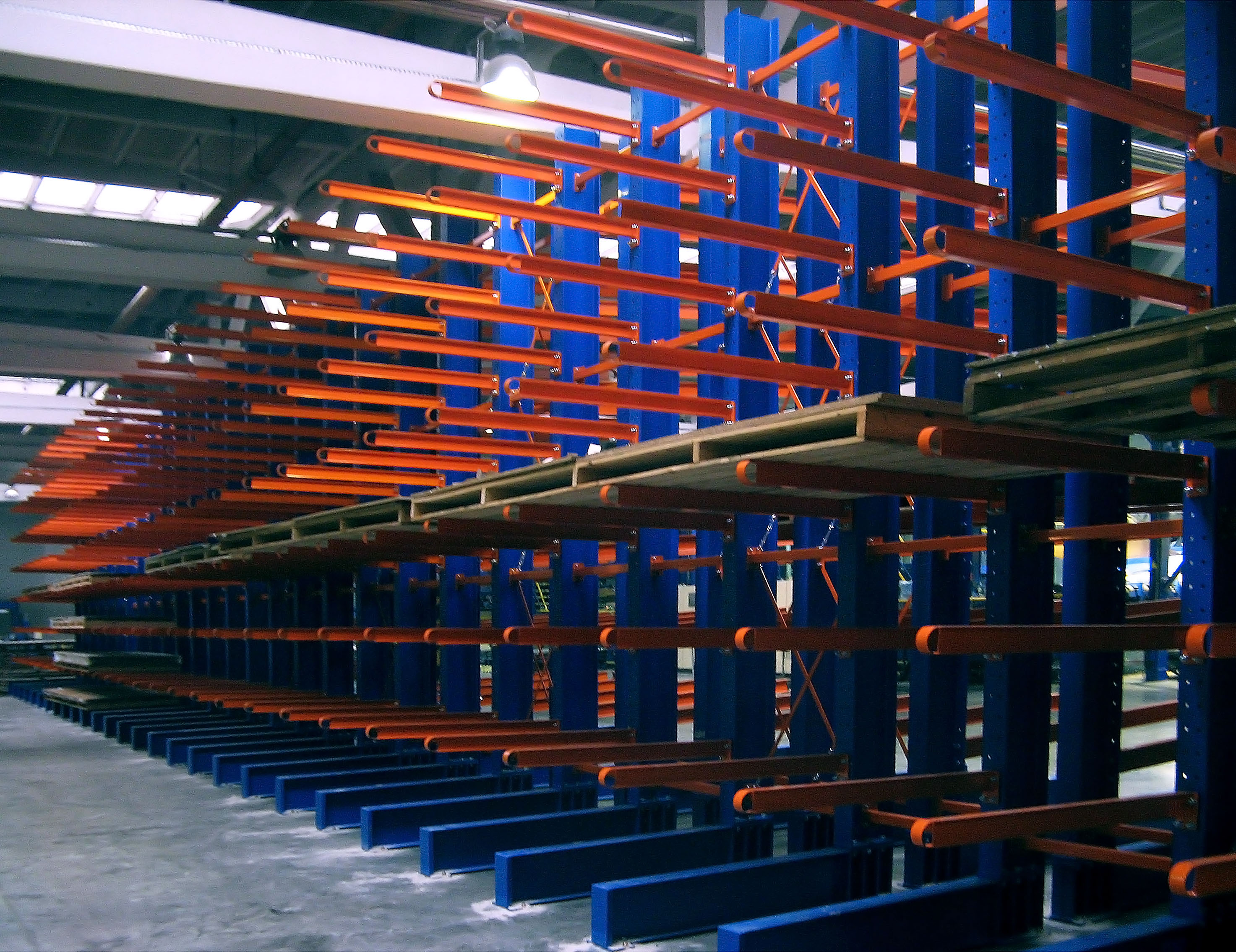 Фото односторонней конструкции